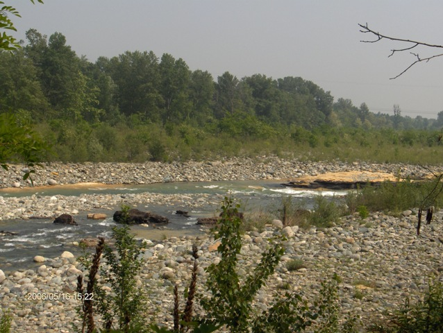 Stura di Lanzo, fotografia originale scattata in zona compresa tra i comuni di Nole e Cirié (autore: Tapion)